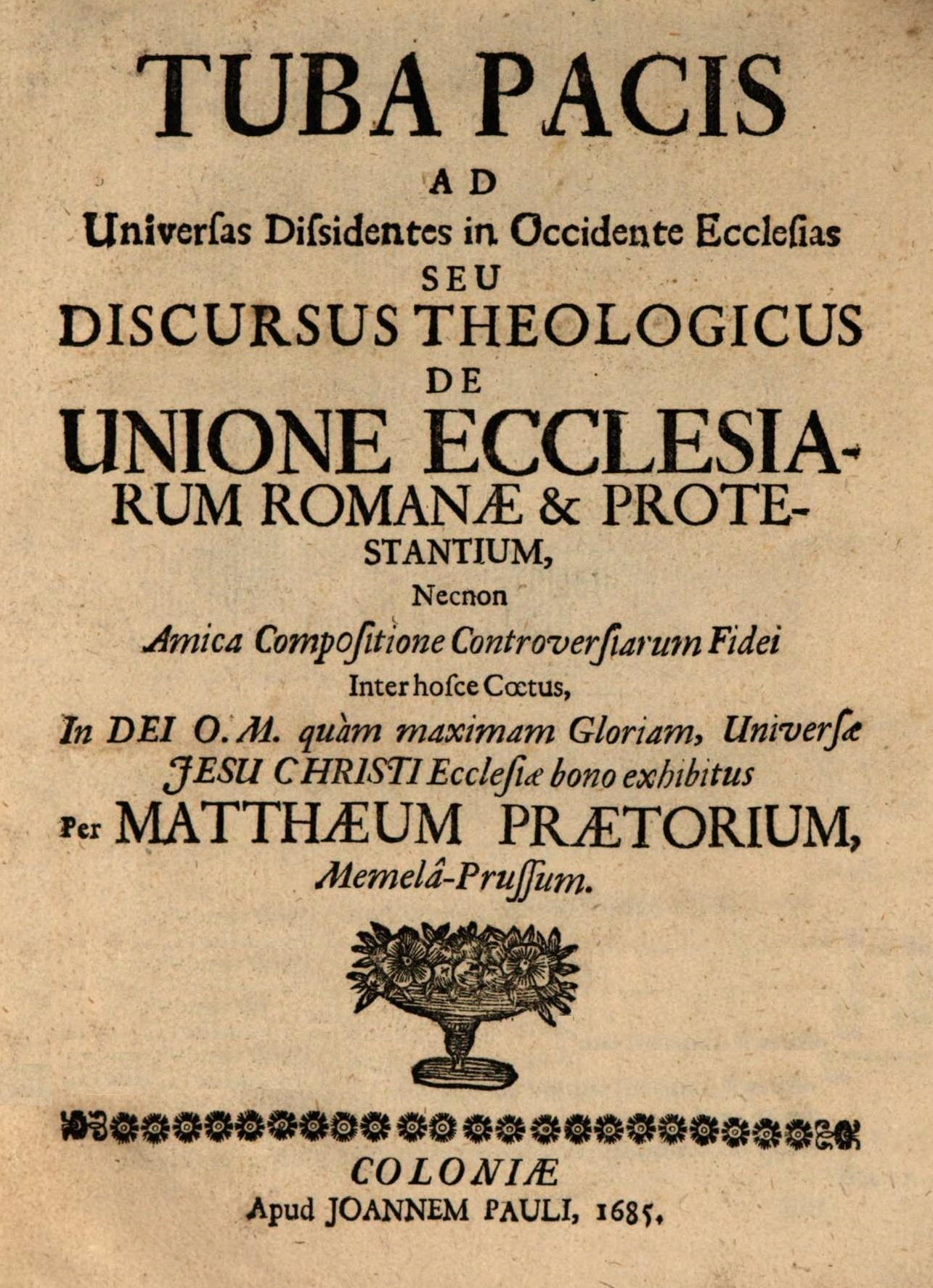 Titelblatt von Matthäus Prätorius' Entwurf für die Vereinigung der christlichen Konfessionen